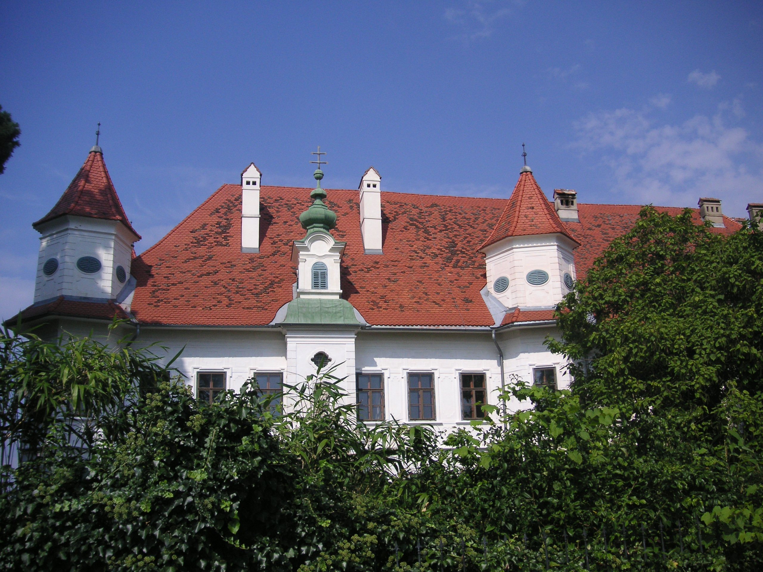 Schloss Altenberg in Hitzendorf, Steiermark, Österreich